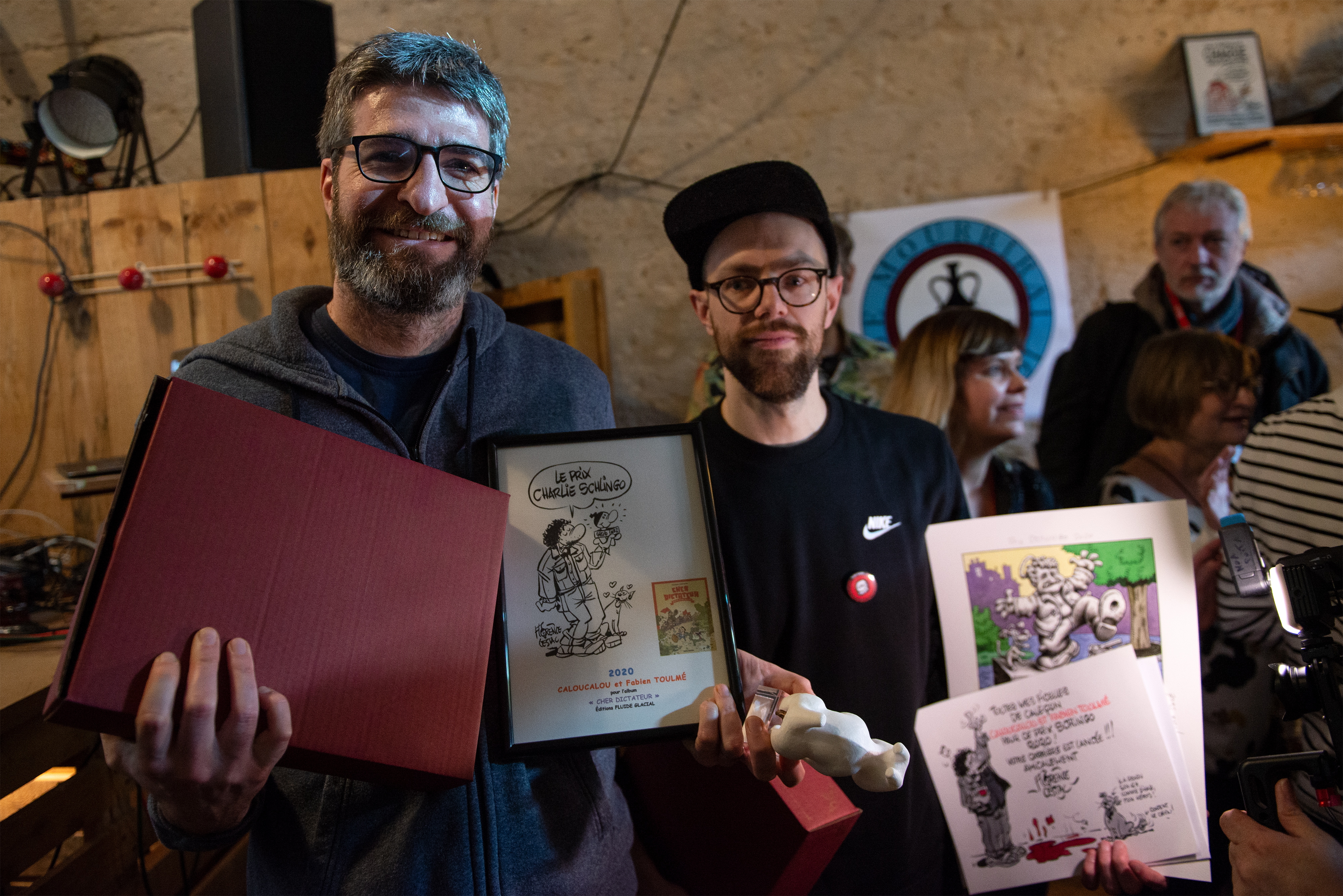 Remise du prix Charlie Schlingo à la Maison Off of Off, Festival International de la Bande Dessinée d'Angoulême 2020.